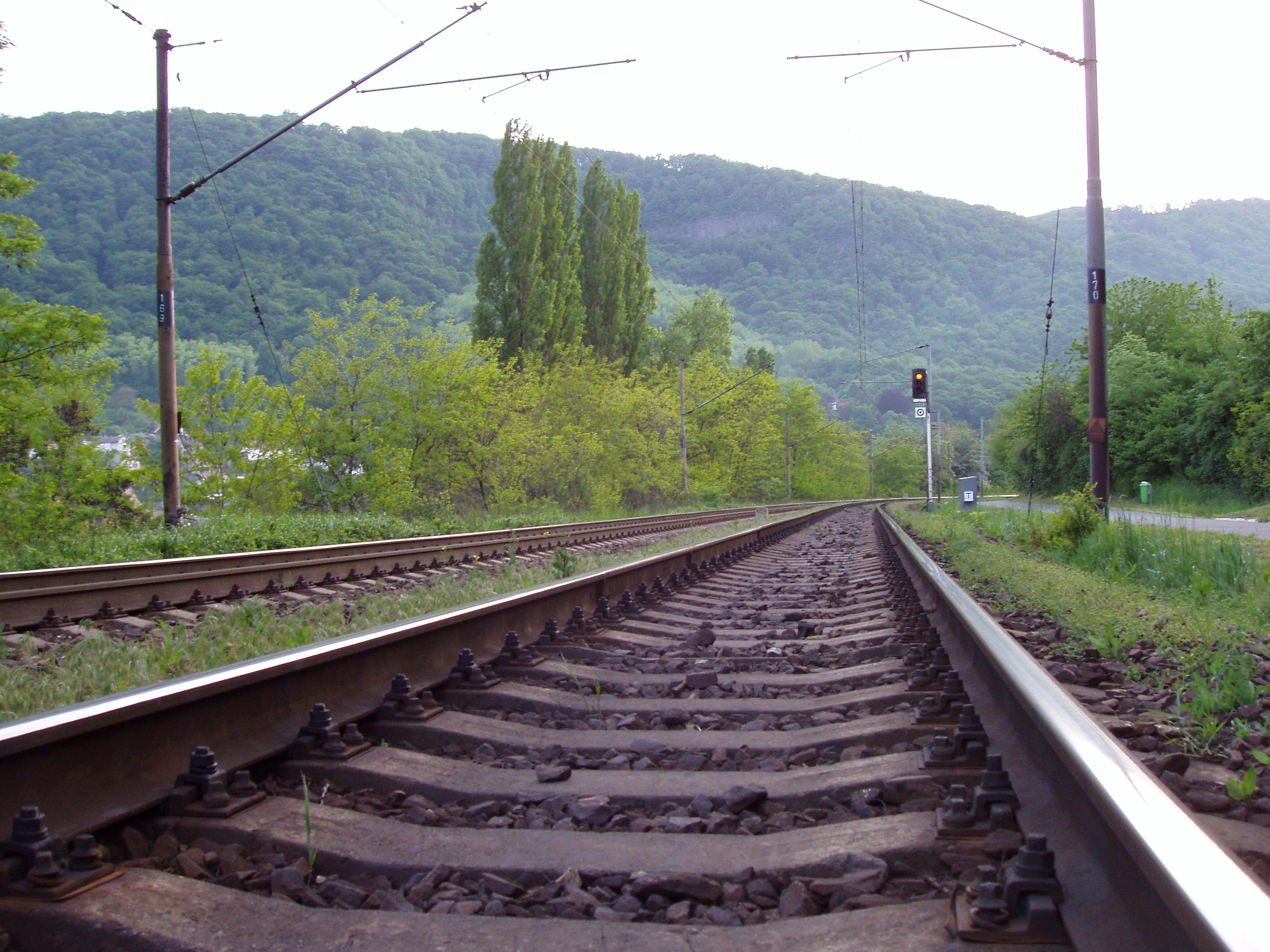 Železniční trať v Brné nad Labem